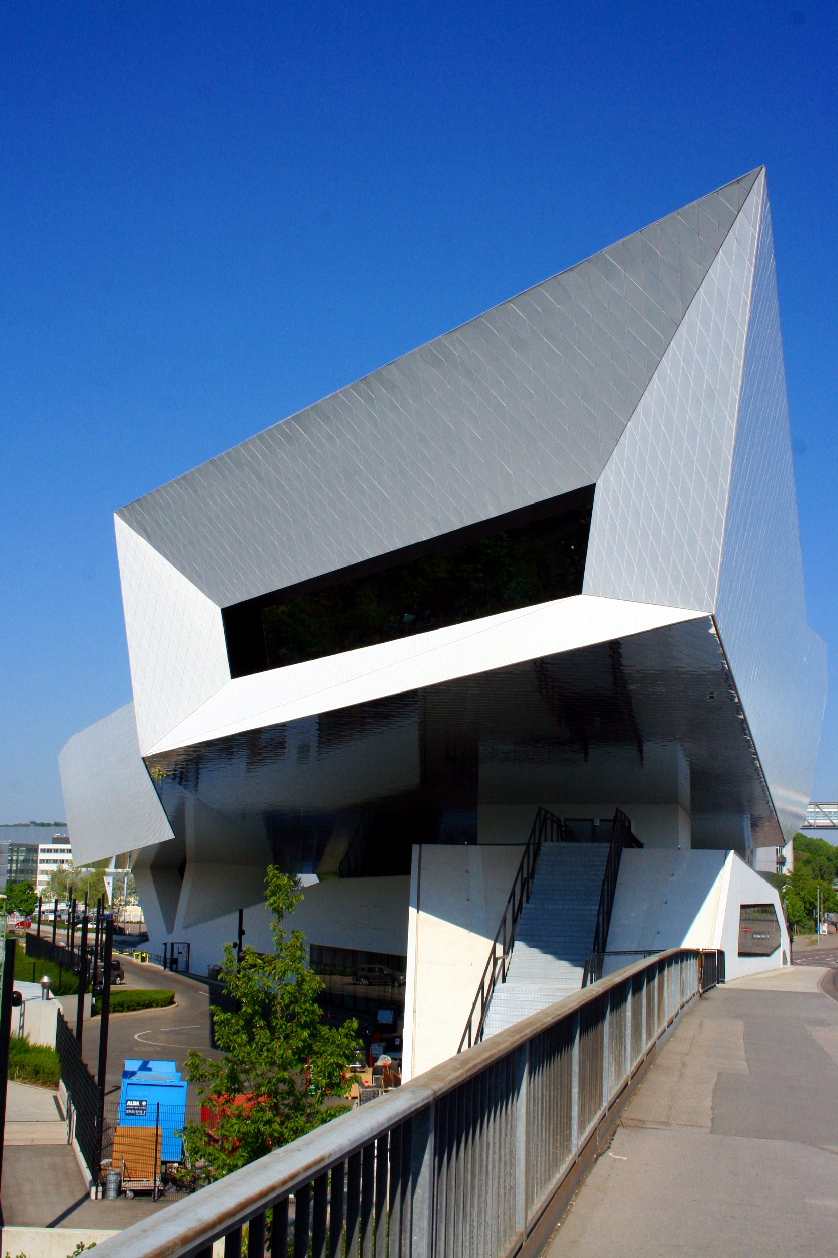 Porsche-Museum in Stuttgart-Zuffenhausen